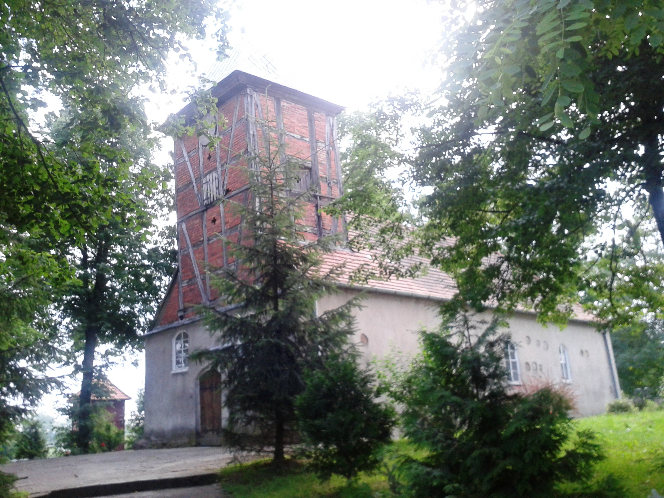 Rydzewo (gmina Drawsko Pomorskie) - kościół